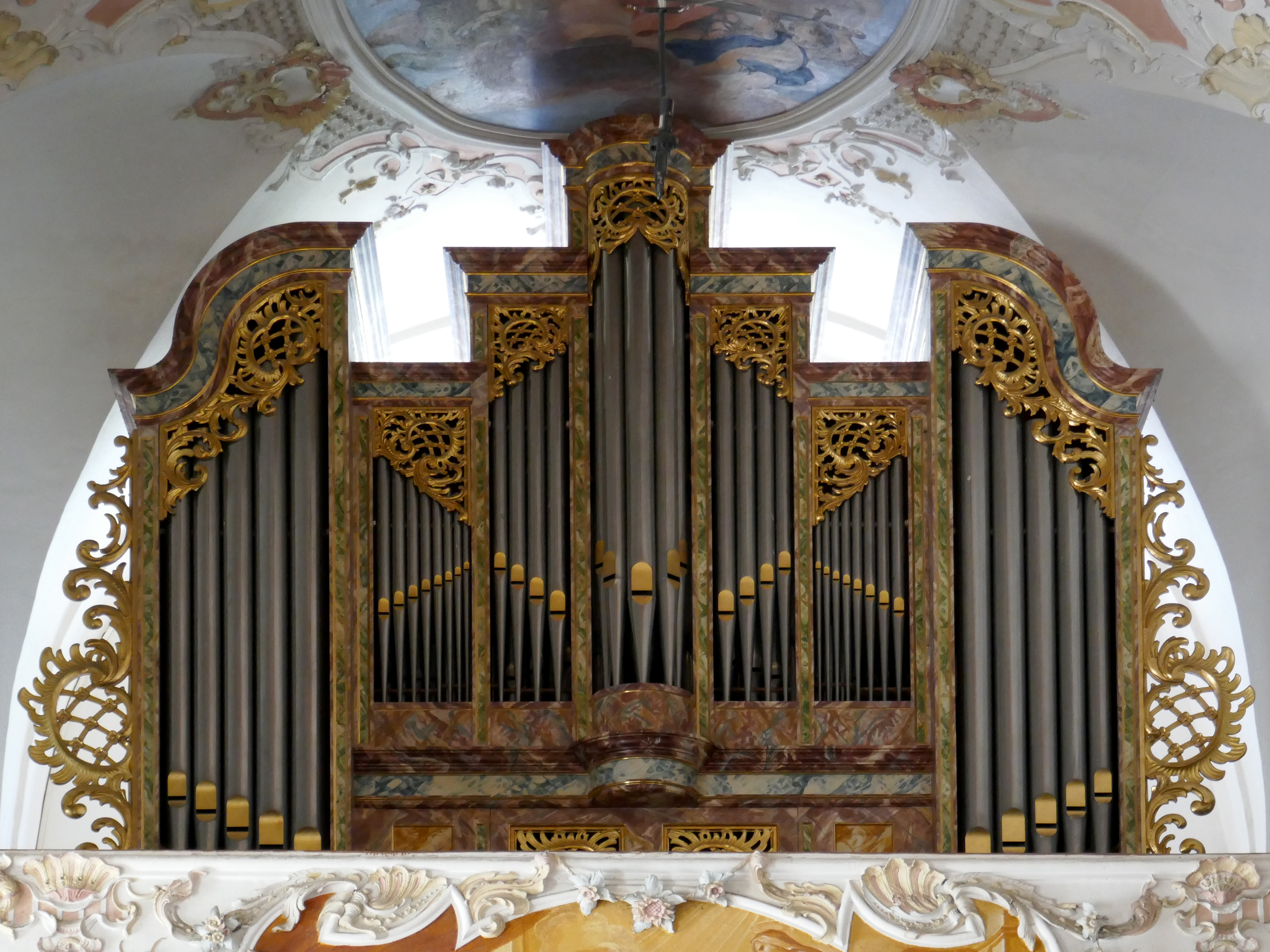 Wilhelm-Backhaus-Gedächtnisorgel ; Stifter: Wilhelm Backhaus; Metzler Orgelbau 1970/71; Einweihung 11. Juni 1971; Stiftkirche Ossiach (Pfarrkirche Mariä Himmelfahrt).